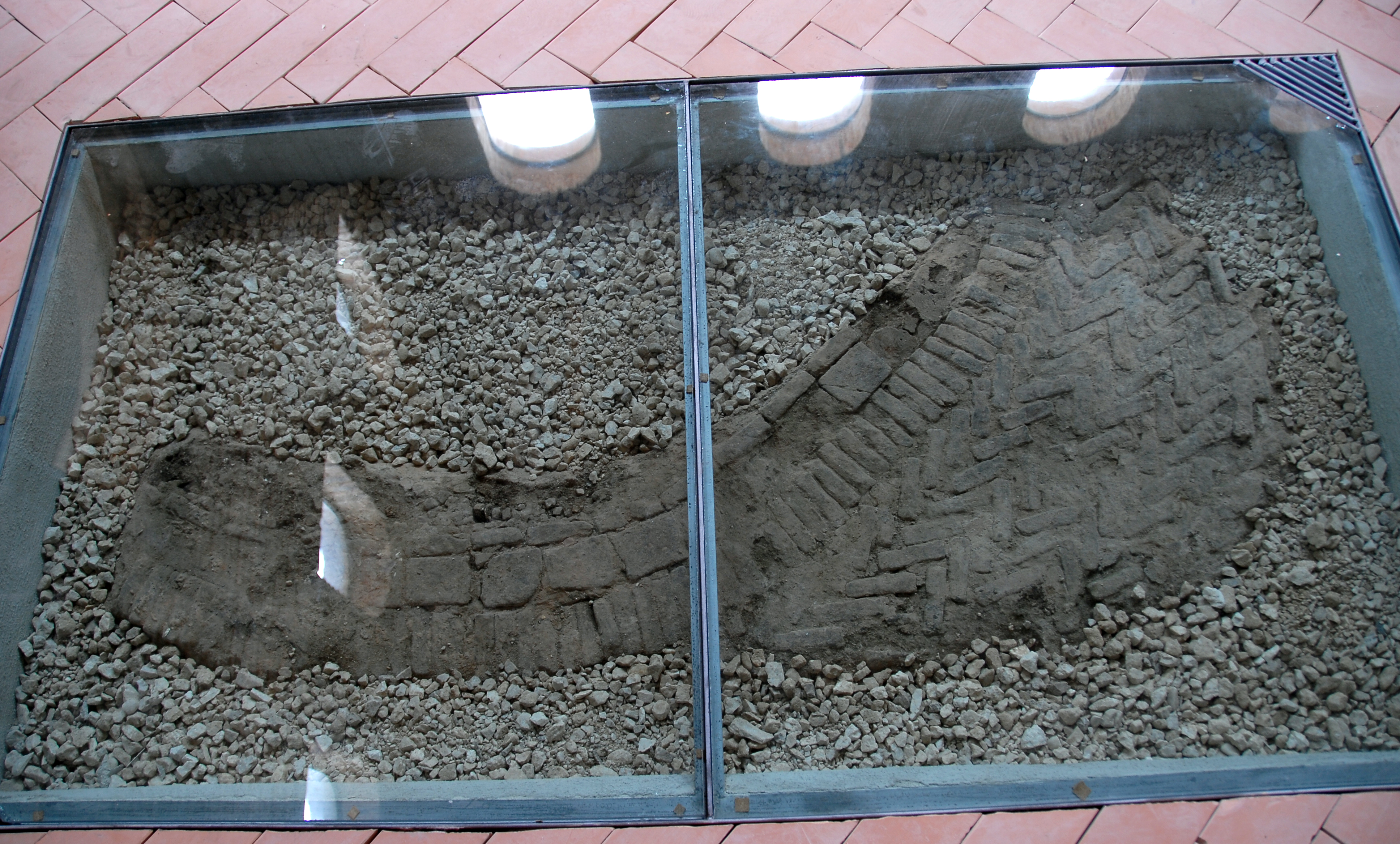 == Licenza d'uso: ==